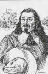 Portrait factice de Germain Doucet par E. Sénécal (1980)